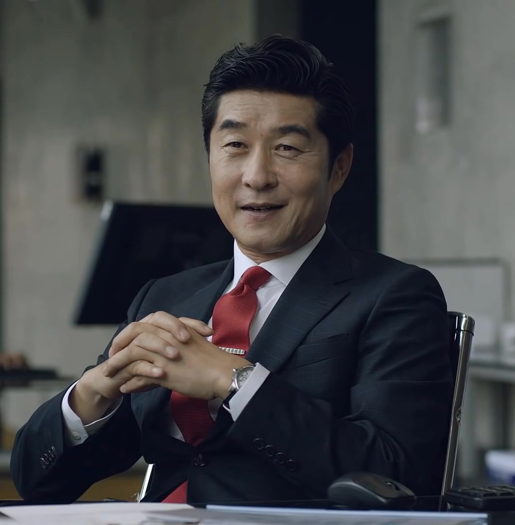 배우 김상중 위너스톡기업 광고 cf영상